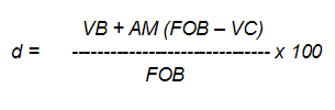 Fórmula para las retenciones móviles a la exportación establecidas por la Resoución 125/2008 (art. 1) del Ministerio de Economía y Producción de Argentina.